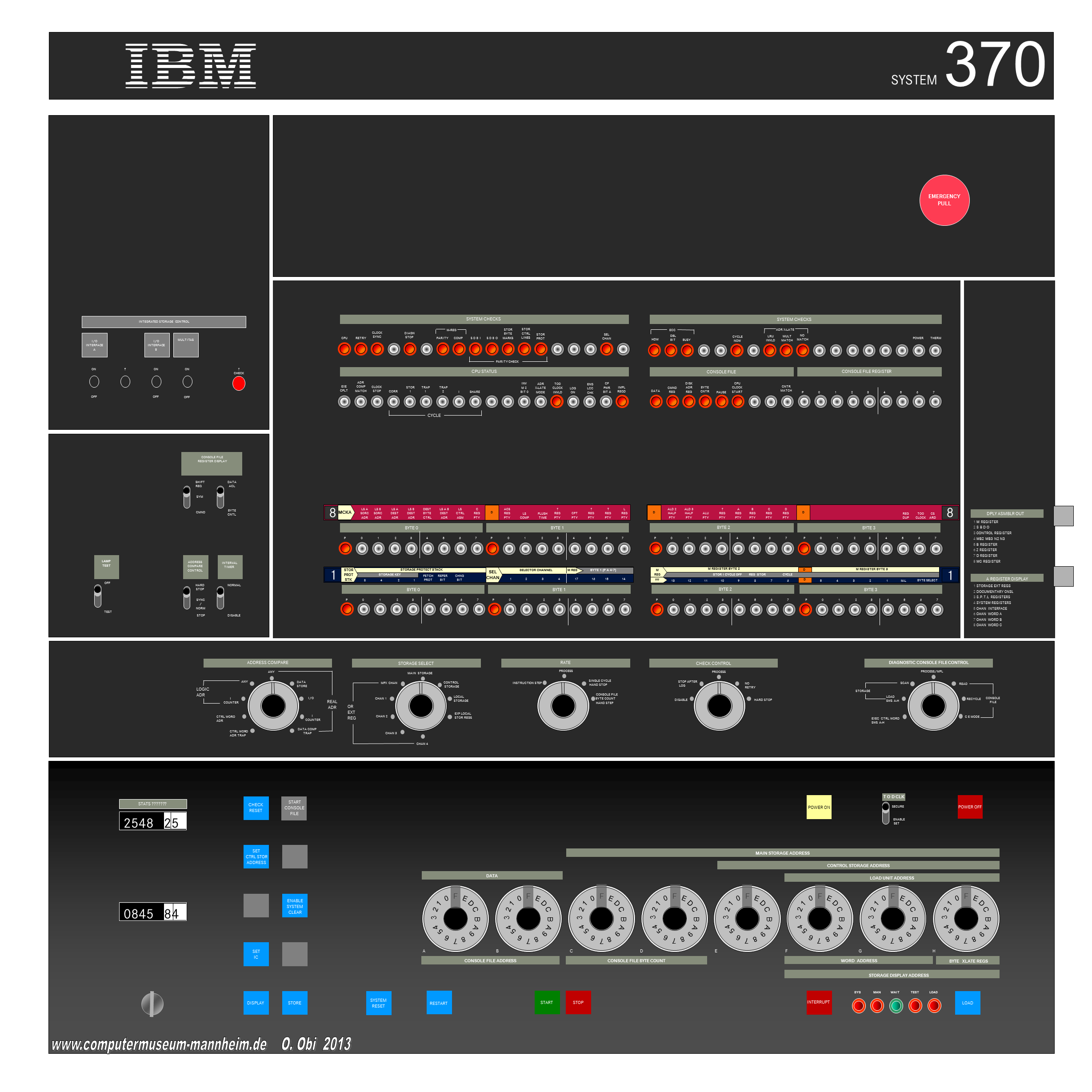 IBM /370-145 System-Konsole